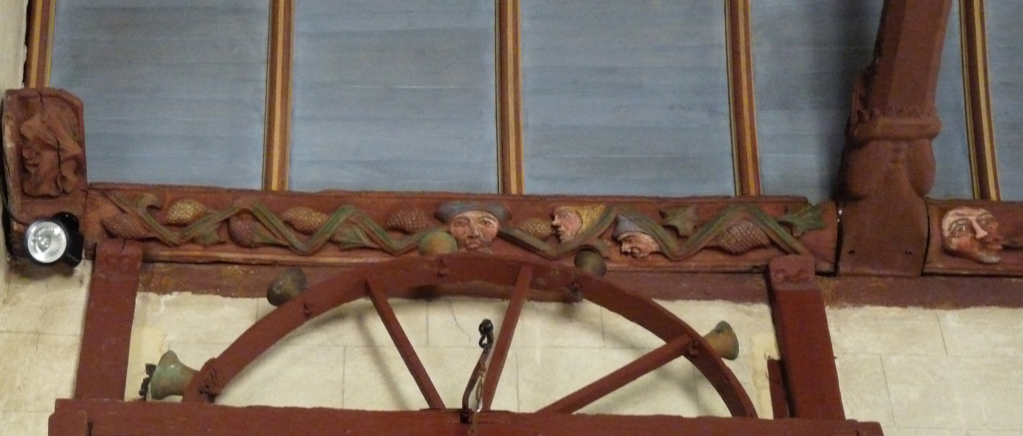 Mandarin chinois sculpté sur une sablière surplombant la roue à carillon de l'église Notre Dame de Confort (Confort-Meilars, Finistère, Bretagne)